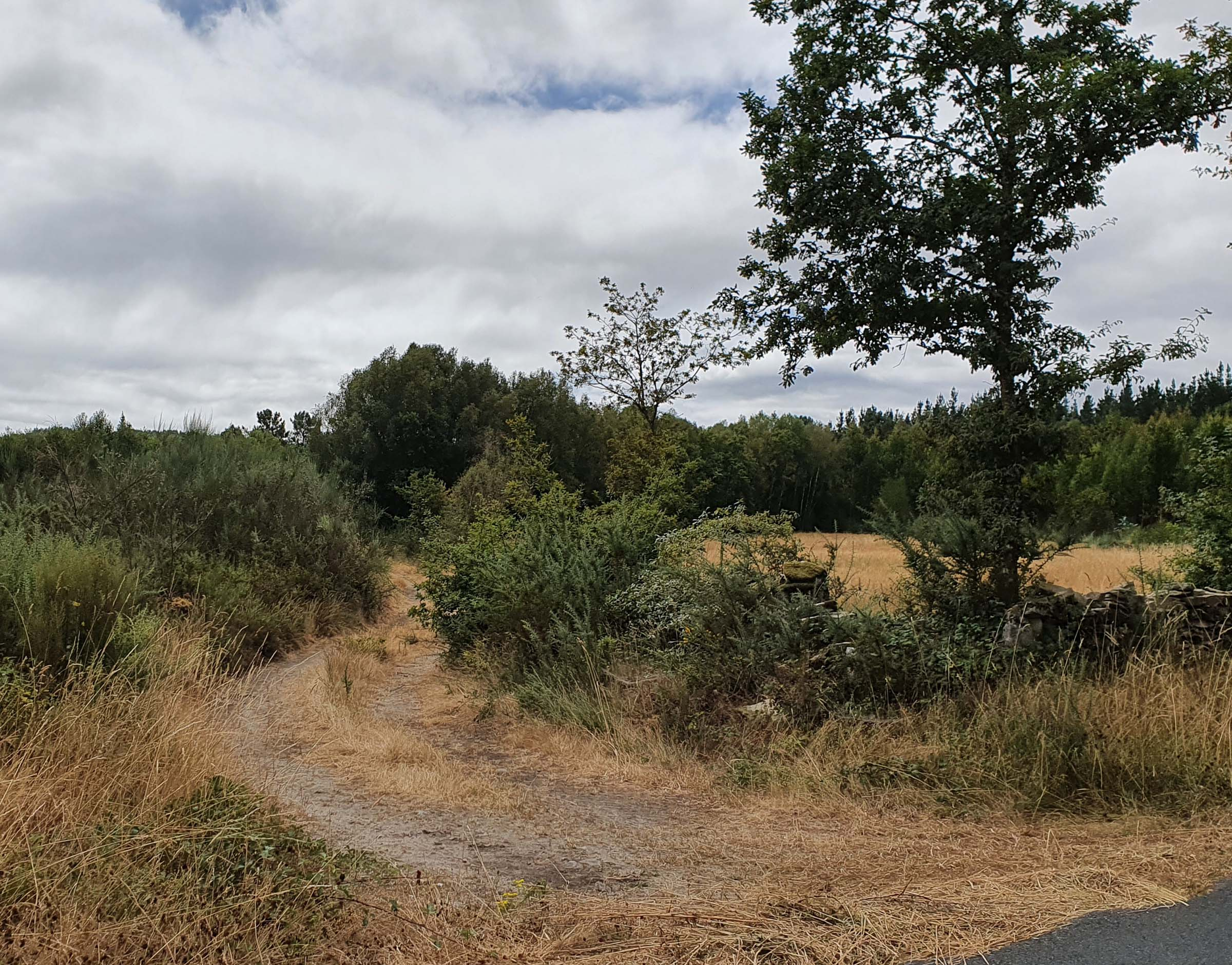 Lugar despoboado de Lamas, na parroquia de Peibás, en Antas de Ulla (Lugo)